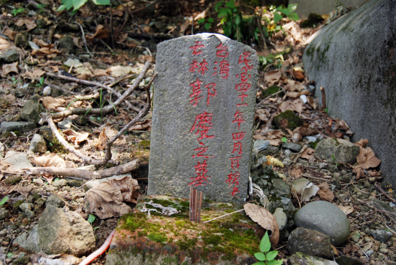 台北六張犁戒嚴時期政治受難者墓區，第2墓區，郭慶之墓